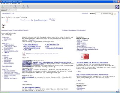 Capture d'ecran de HotJava éffectuée par mes soins. Placée en GFDL. Utilisateur:Traroth